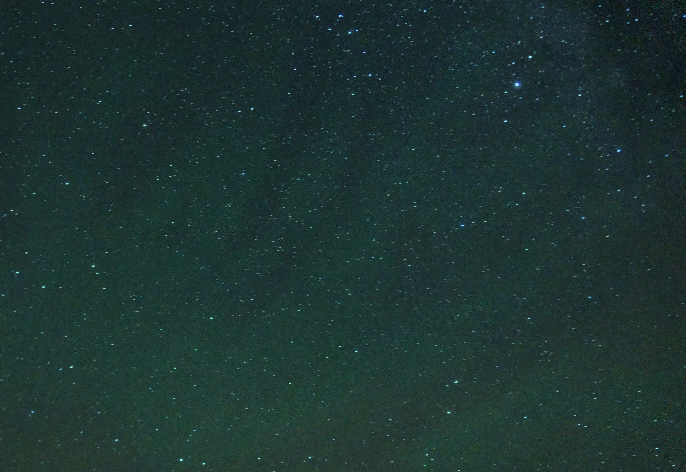 Plus faible que la lumière zodiacale, cet airglow (ou lumière nocturne) a été photographié dans le ciel de l'Allier en France. Ces ondulations vertes font penser aux aurores boréales, ce qui n'est pas le fruit du hasard. Ce phénomène se forme à la même altitude, c'est à dire entre 80 et 100 km de haut, dans la thermosphère. Il est visible par les nuits très sombres et sans pollutions lumineuses.